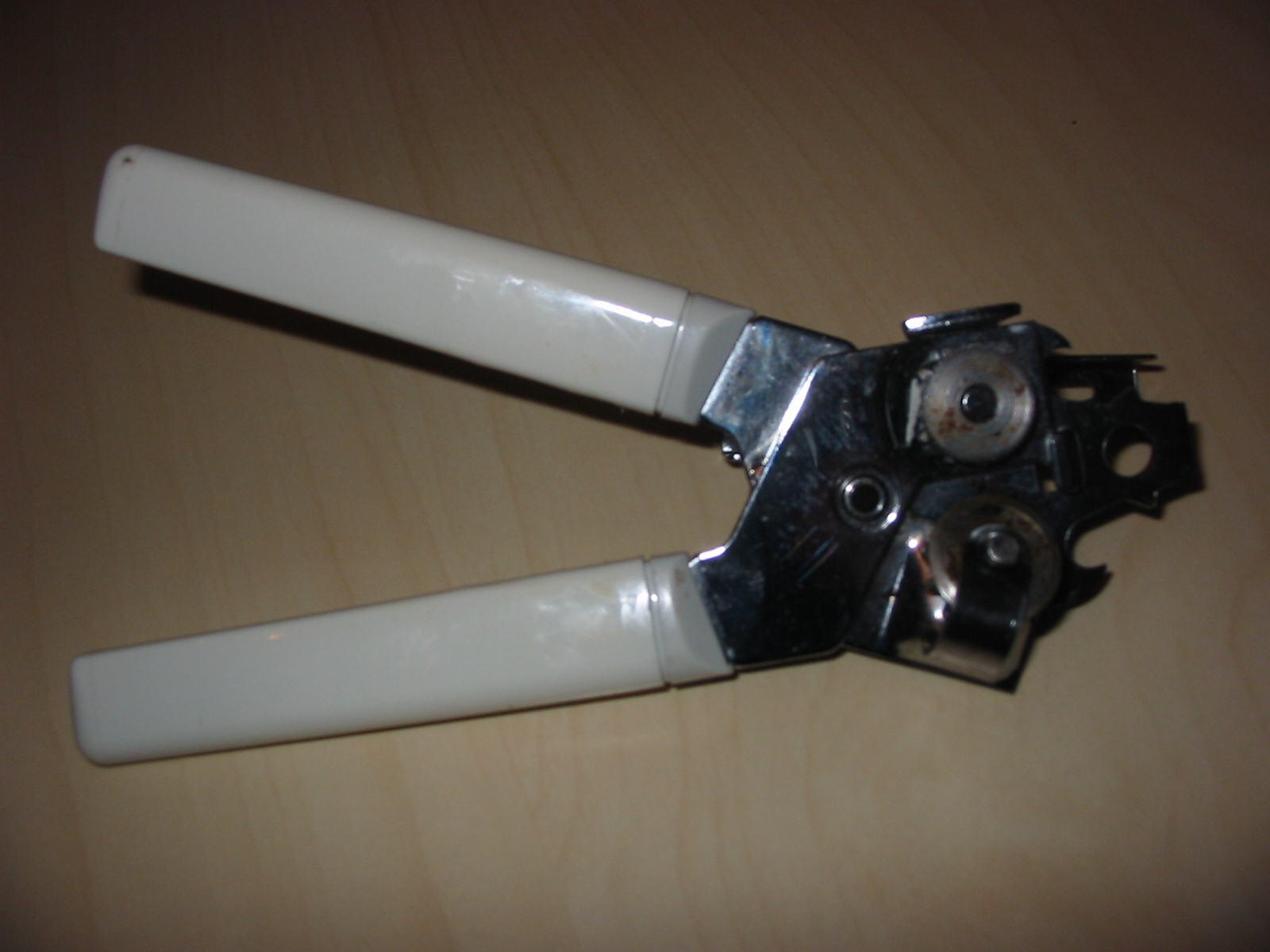 can opener